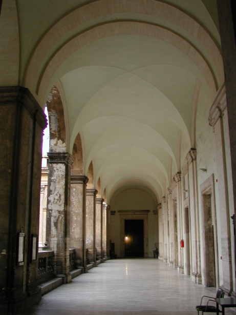 Il Collegio Romano. Autore: Alessandro Ranellucci